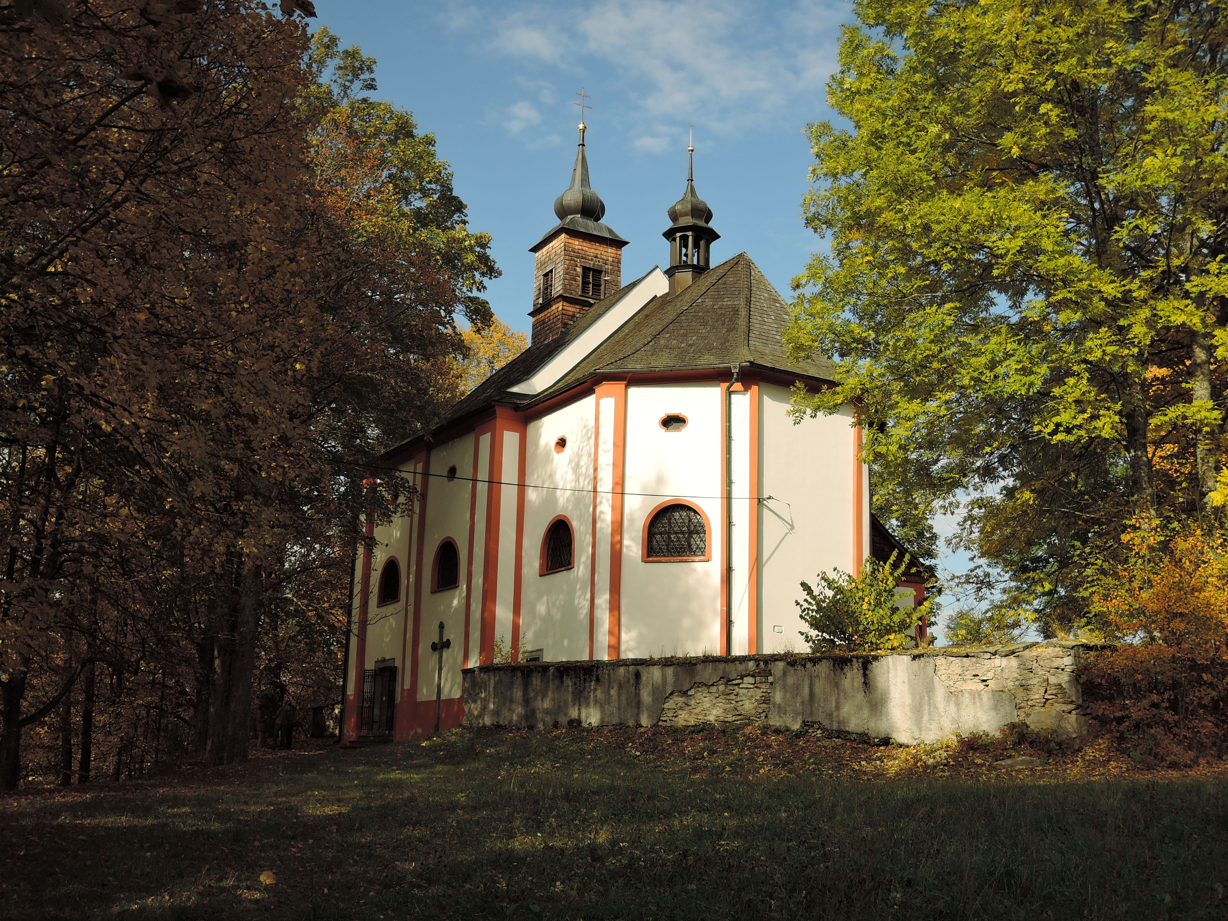 Zelená Lhota, kostel sv. Wolfganga